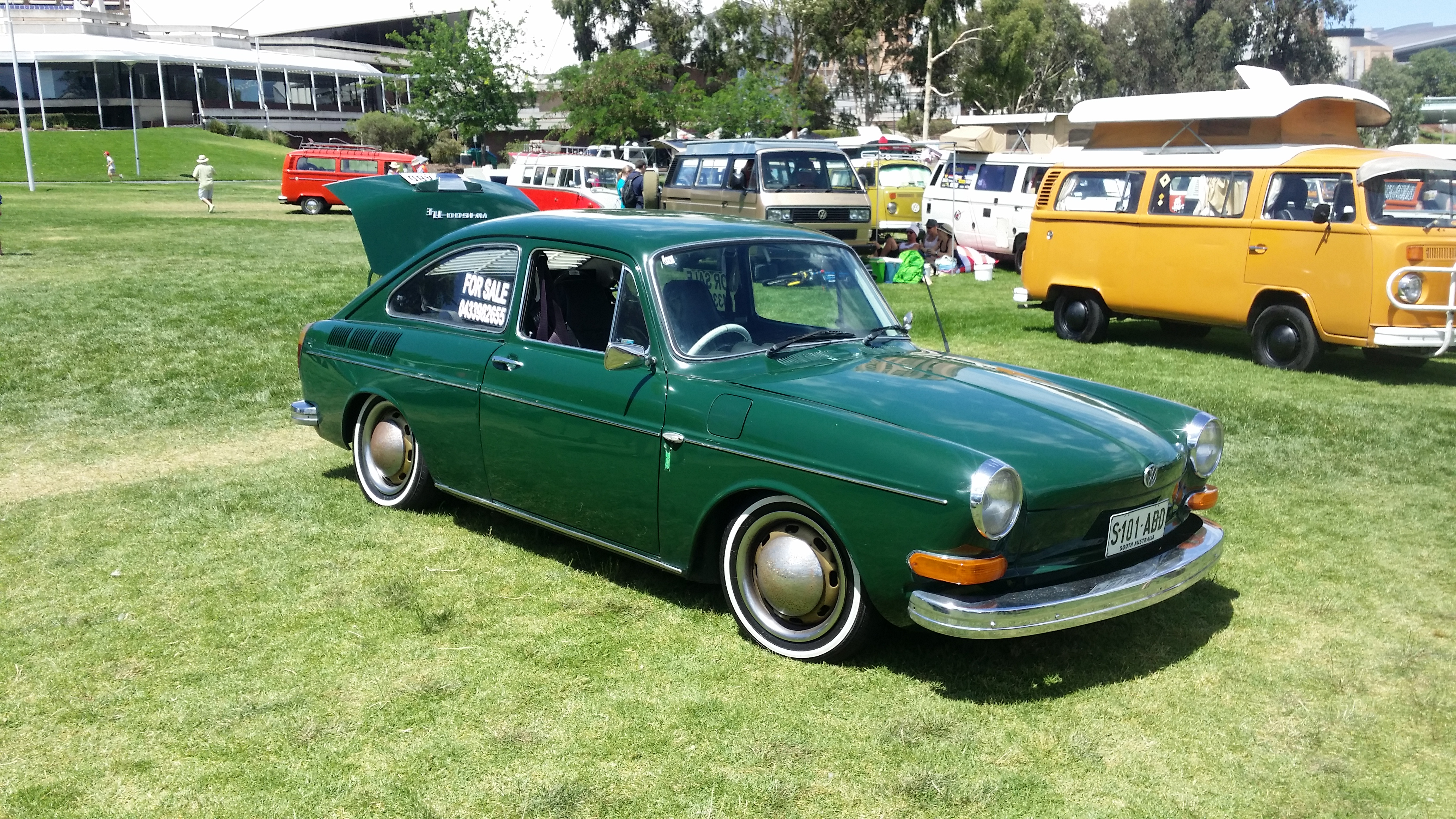 Volkswagen Type 3 fastback